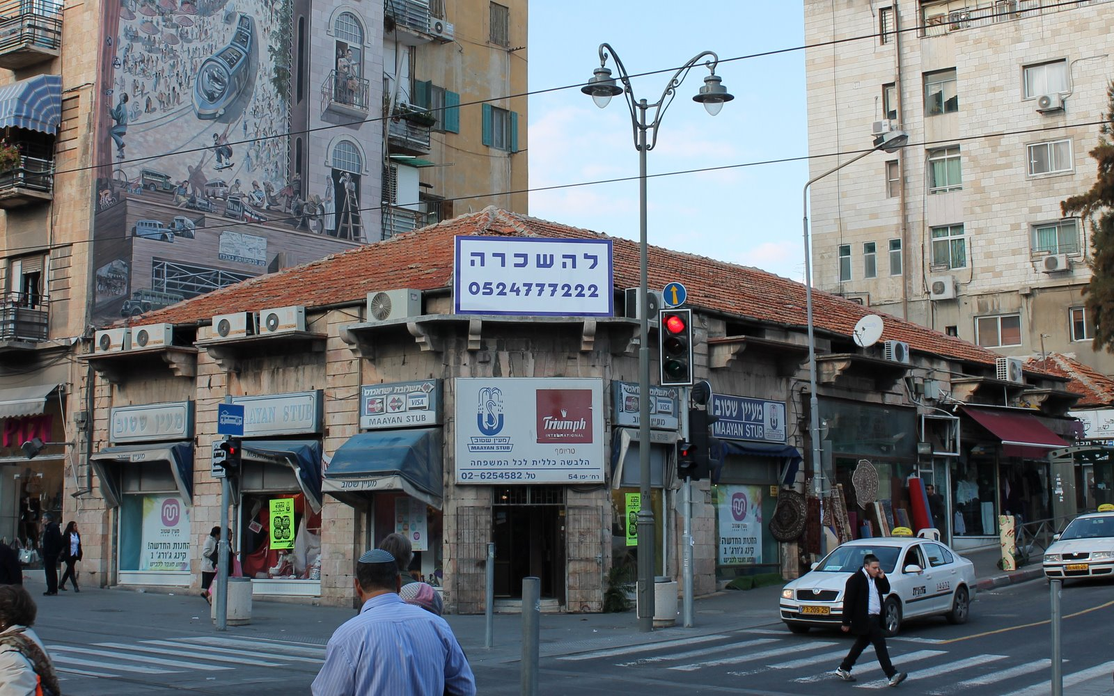 Jerusalem